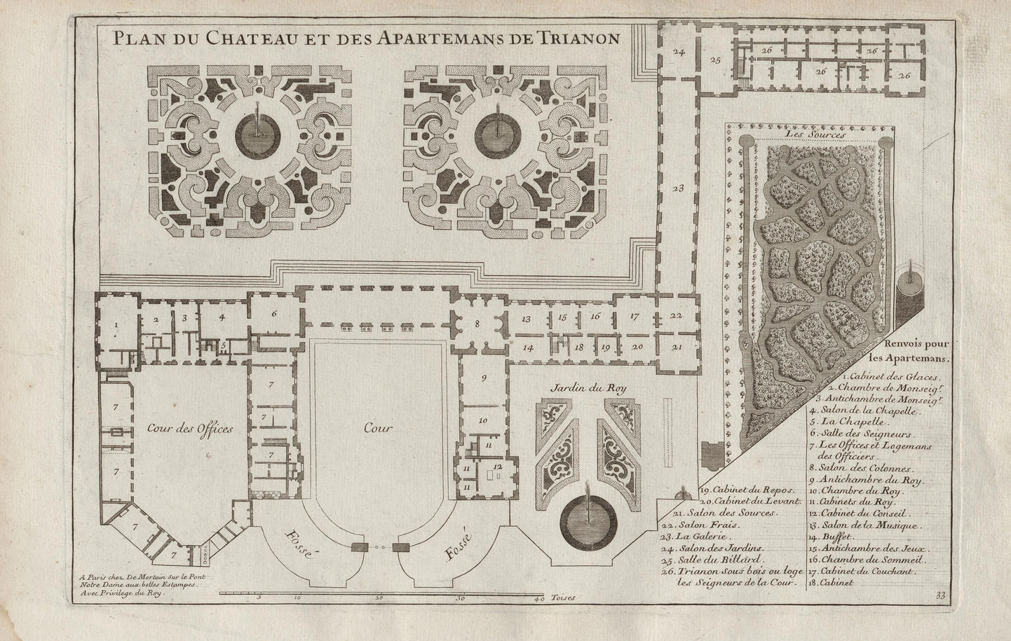 Plan du Château et des appartements de Trianon (sic)